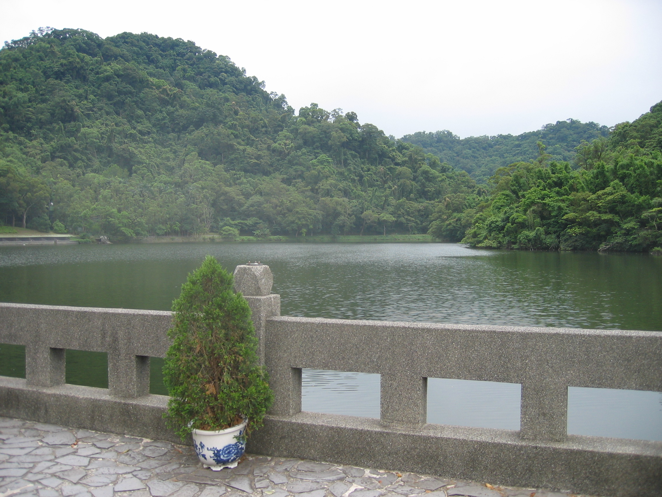 桃園縣大溪鎮的慈湖湖畔。